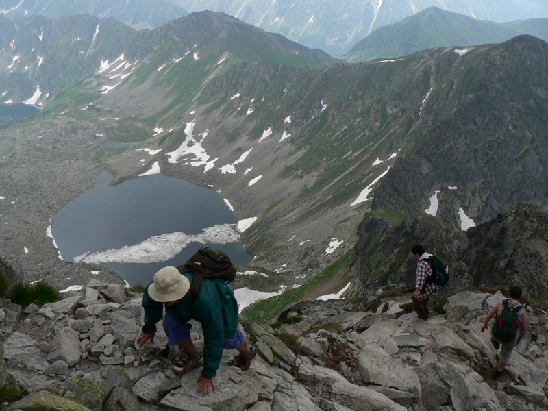 Pohled z vrcholu Svinice k východu do Doliny Pěti polských stavů.